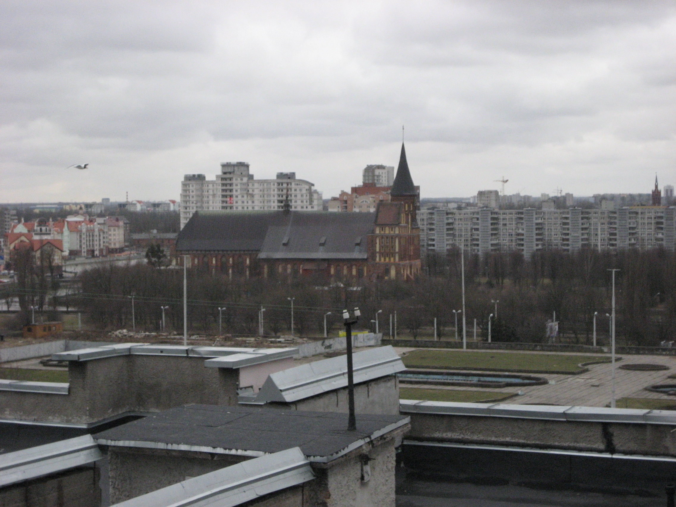 Kaliningrad im März 2009: Blick aus dem Hotel Kaliningrad auf die Dominsel. Ganz links das neue „Fischdorf“